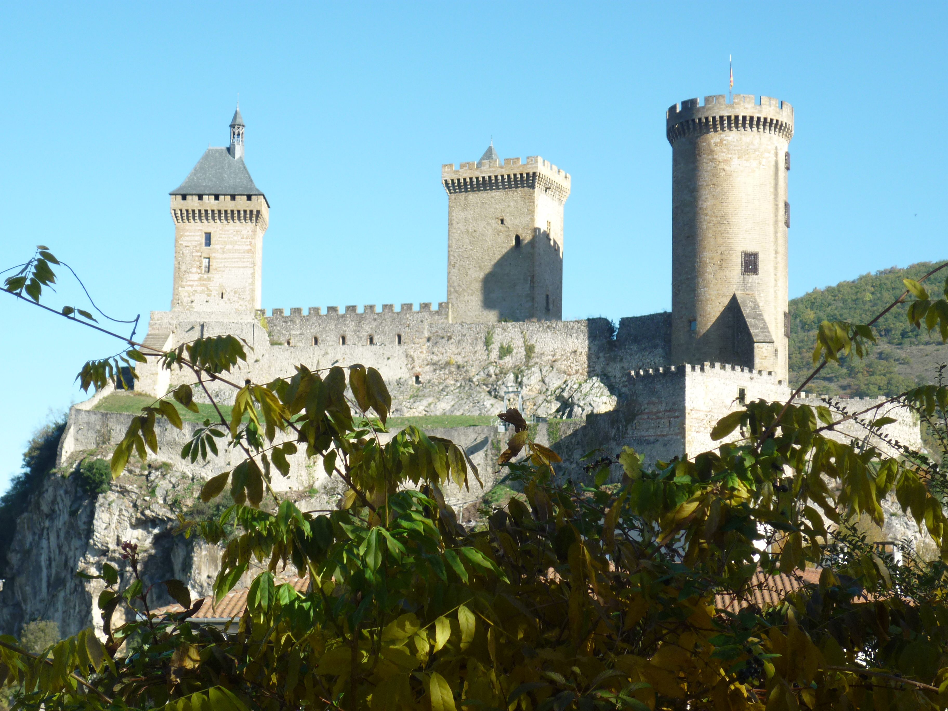 Foix (Ariège, France) : Le château, vue de la face ouest depuis Cap de la ville.